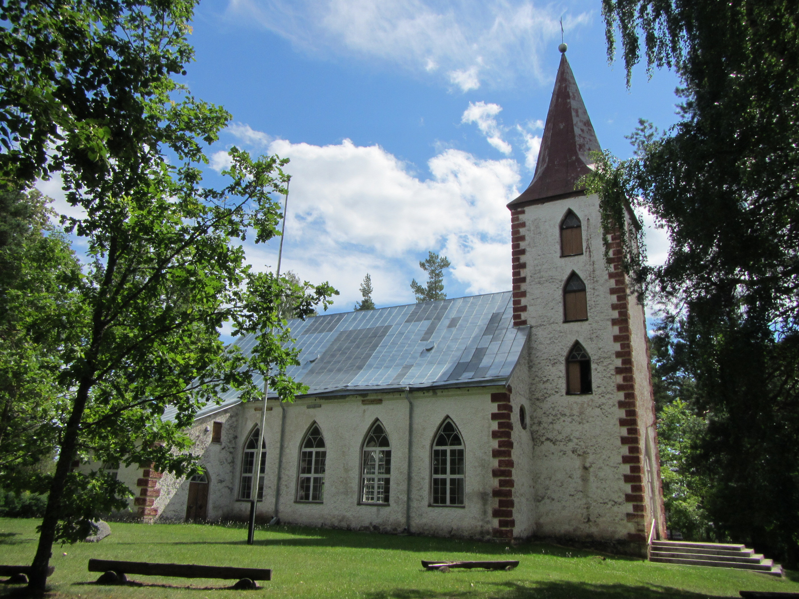 Pindi kirik, Lasva